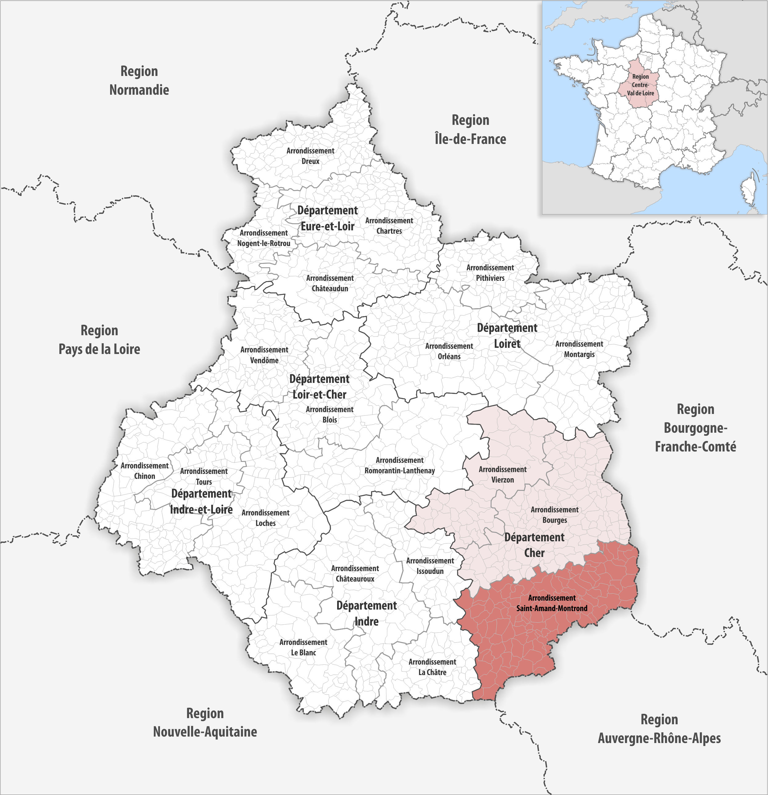 Lage des Arrondissements Saint-Amand-Montrond